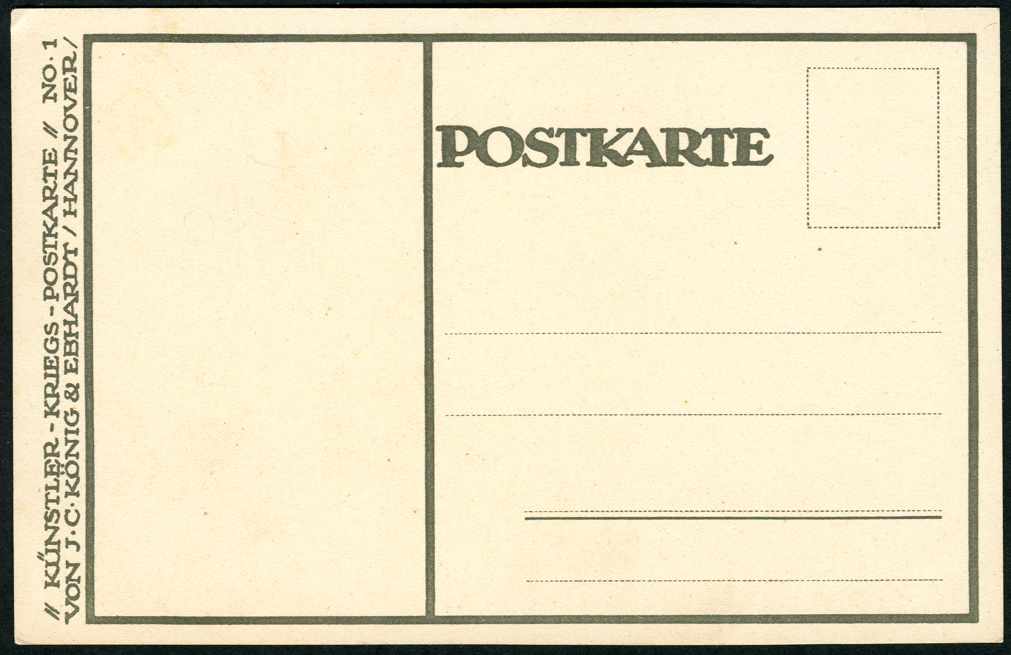 Adressseite (Revers) der „Künstler-Kriegs-Postkarte No. 1 von J. C. König & Ebhardt, Hannover“ die der Grafiker Heinz Keune um 1914 umseitig „Orient's Erwachen“ übertitelte ...